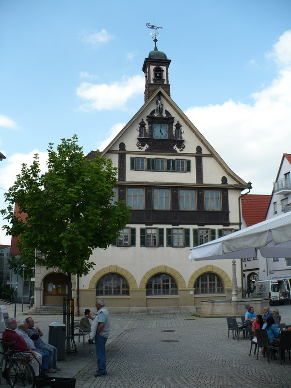 Metzingen Altes Rathaus Front